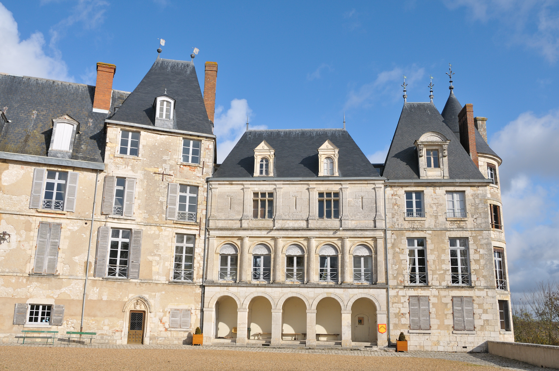 Château de Saint-Brisson-sur-Loire, Loiret, France